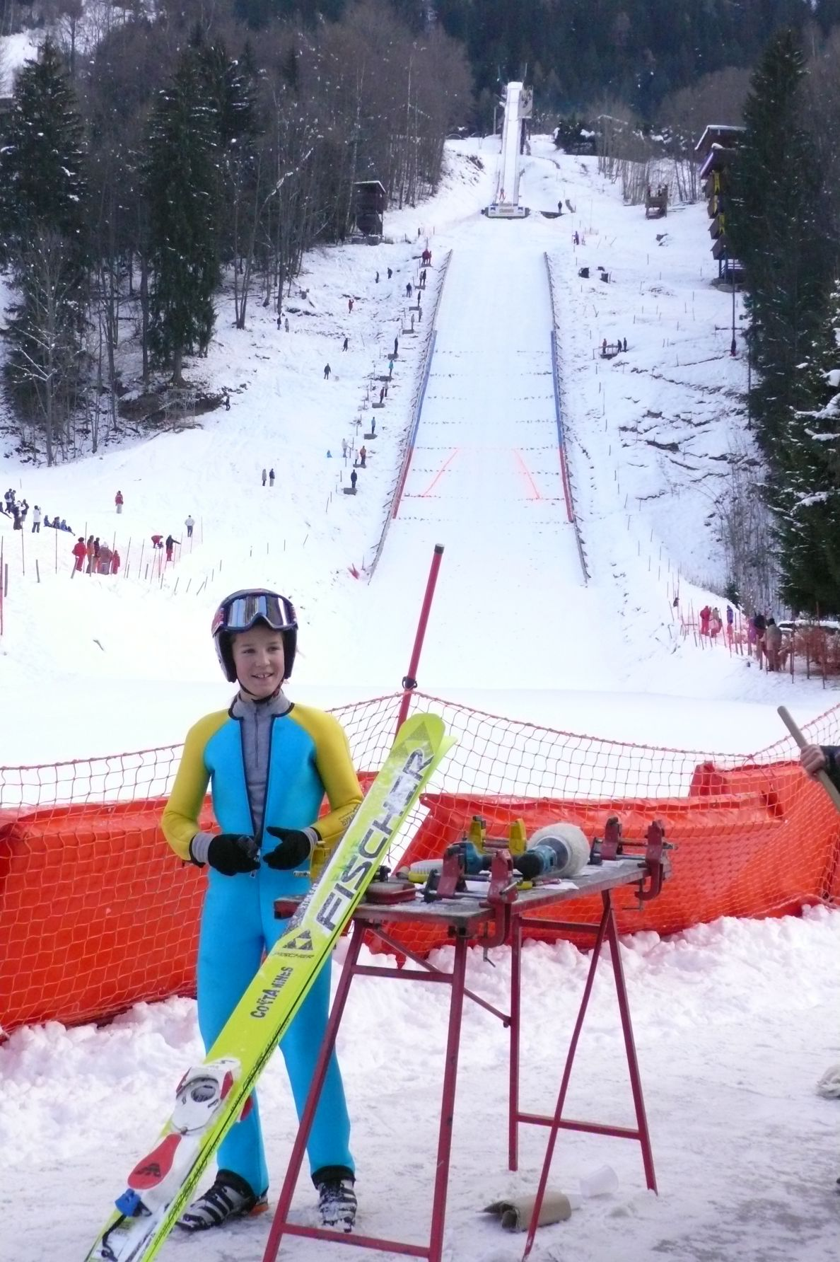 Coline Mattel, ouvreuse de la Coupe de France à Chamonix, et le tremplin des Bossons, à Chamonix